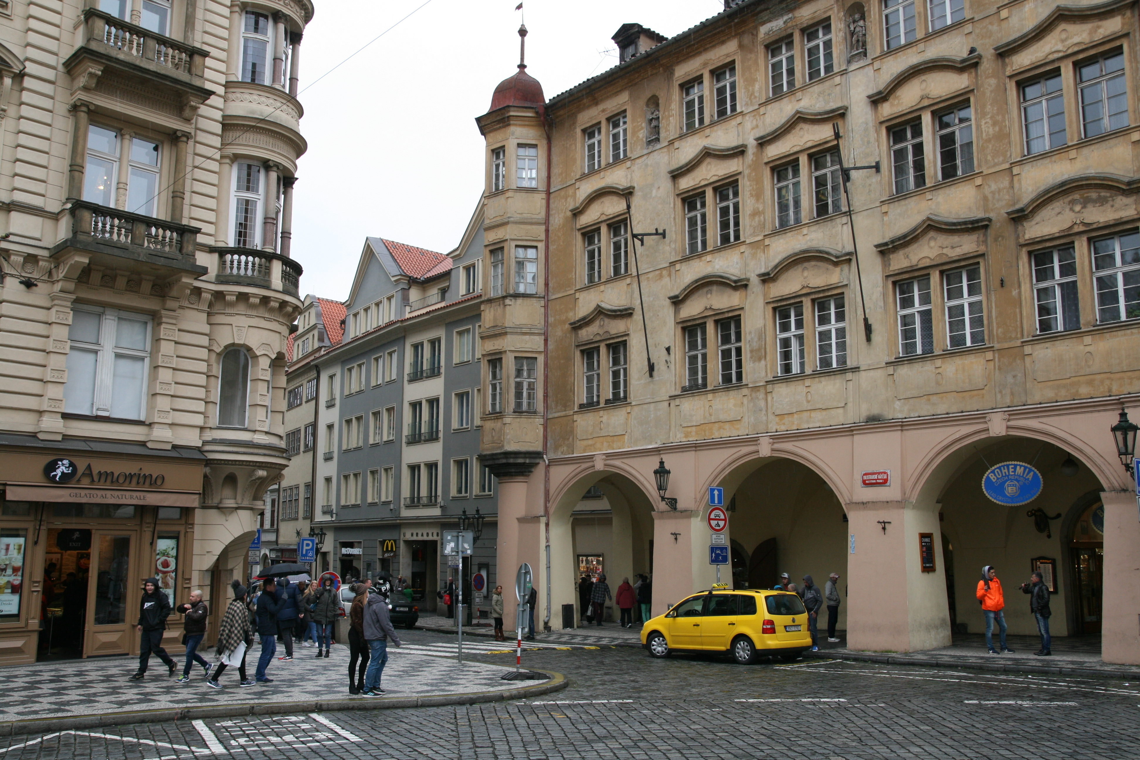 Setkání lektorů: Inovace obsahu kurzu Senioři píší Wikipedii, 8. října 2016, 14.00–18.00, 64 U Hradeb (Mostecká 273/21, Praha). Místo konání, pohled z Malostranského náměstí.